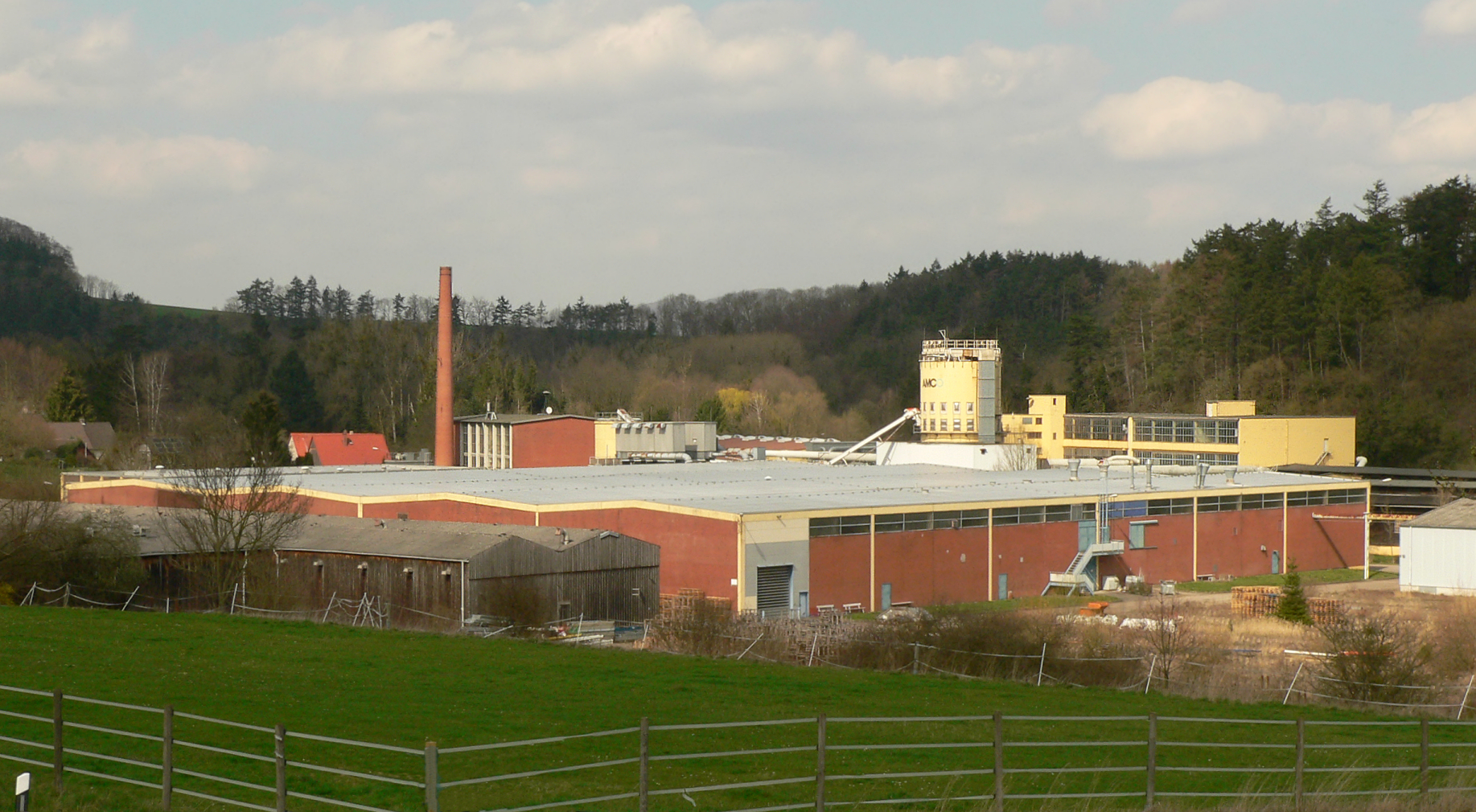 AMCO-Fabrik in Kirchbrak